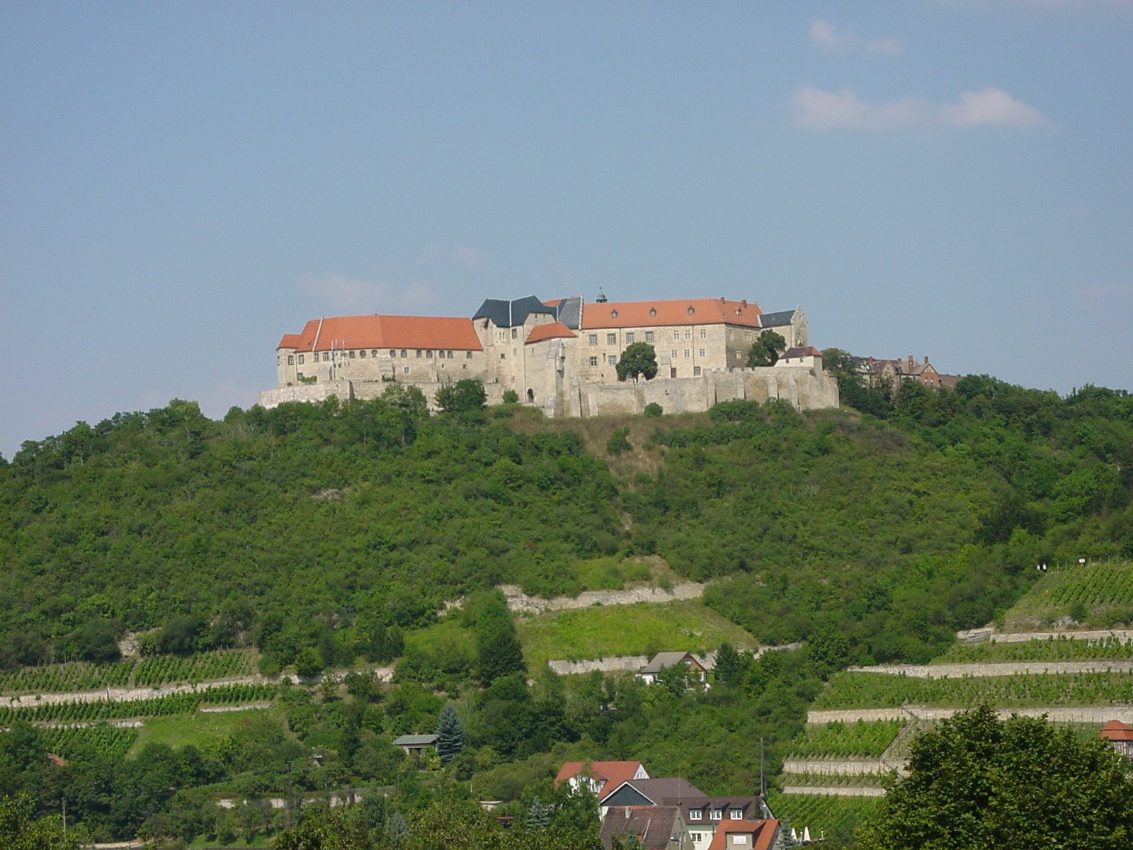 Neuenburg - Gesamtansicht